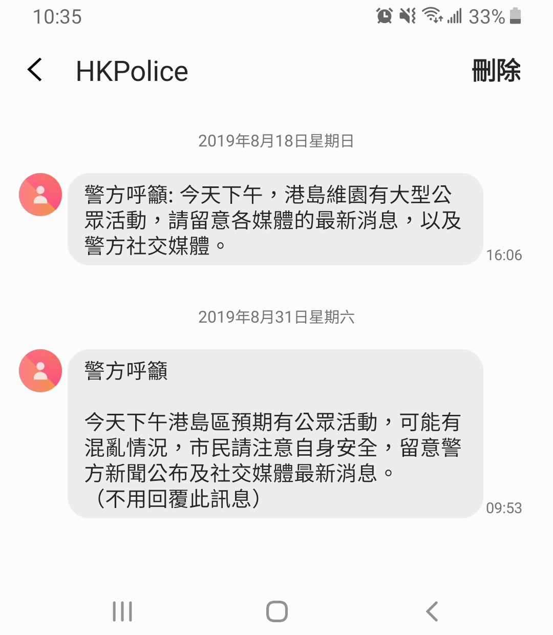 中文（香港）: 2019年8月31日香港反對逃犯條例修訂草案示威前夕收到的警方訊息。手機型號：Samsung Galaxy A6+